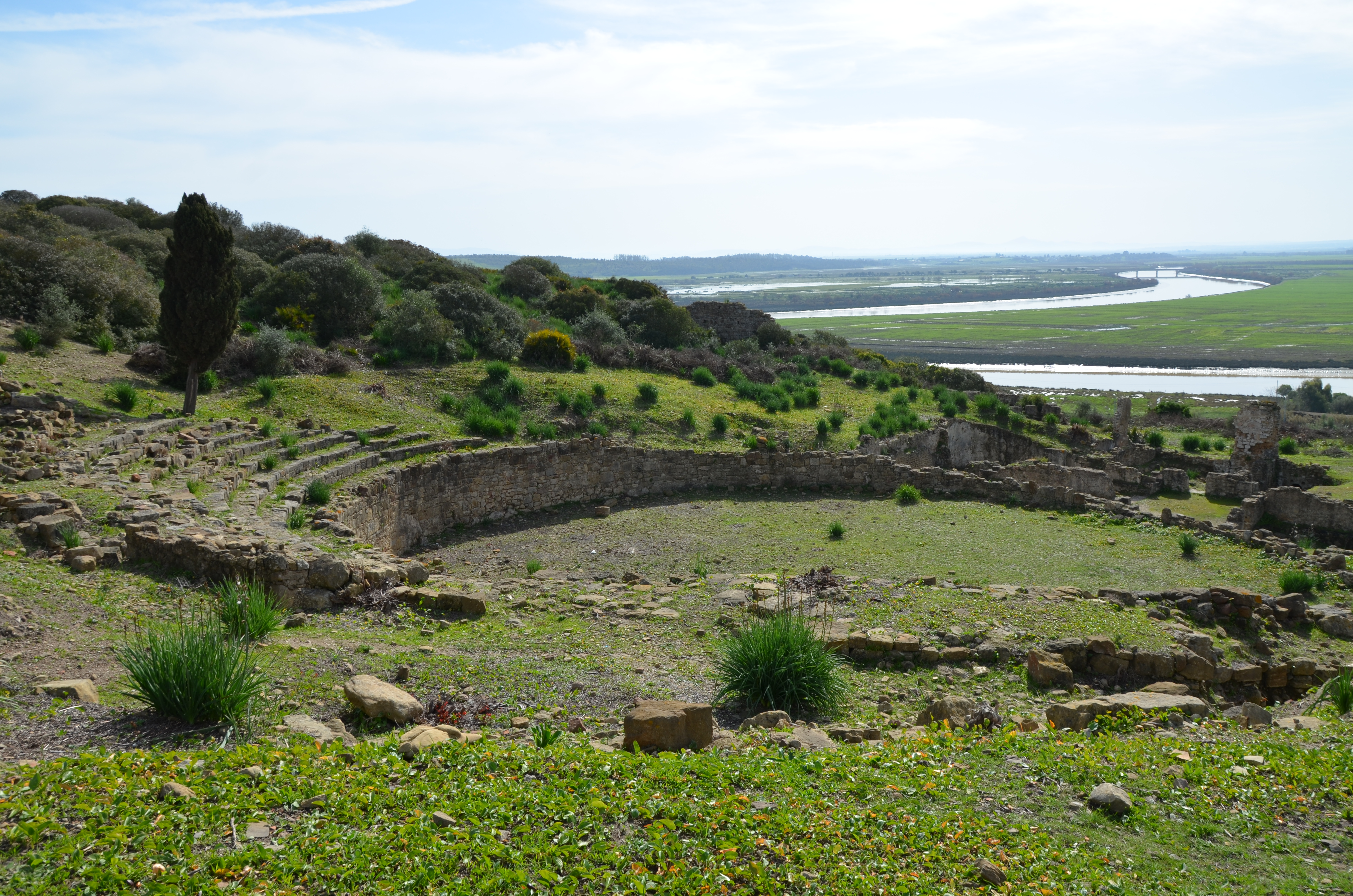 Lixus, Morocco